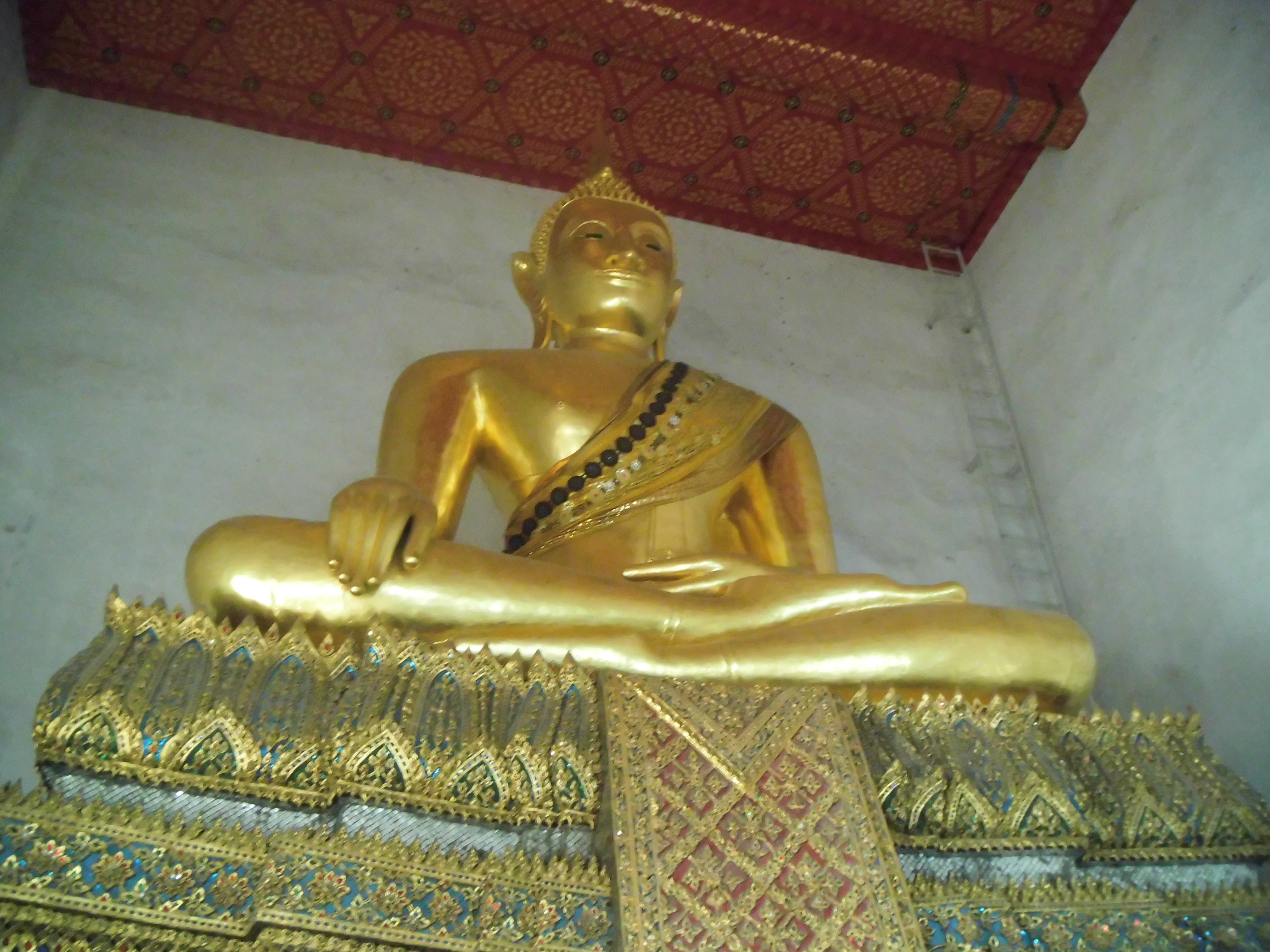 วัดประยุรวงศาวาส